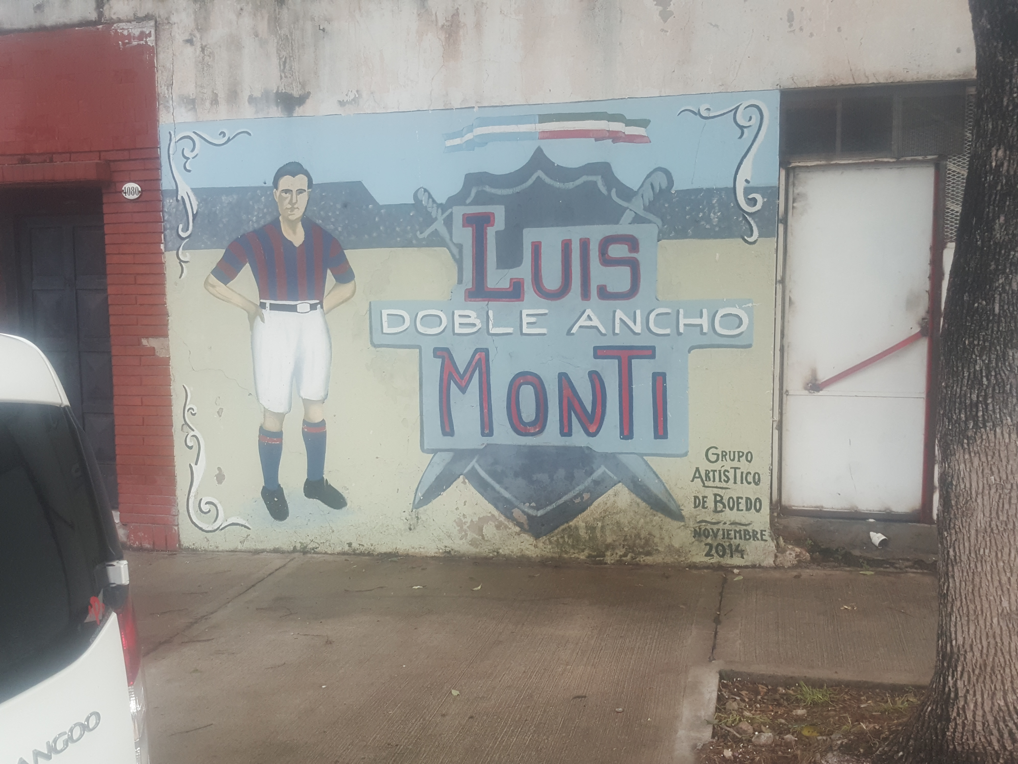 Mural dedicado a Luis Monti en el barrio de Boedo, ciudad de Buenos Aires.